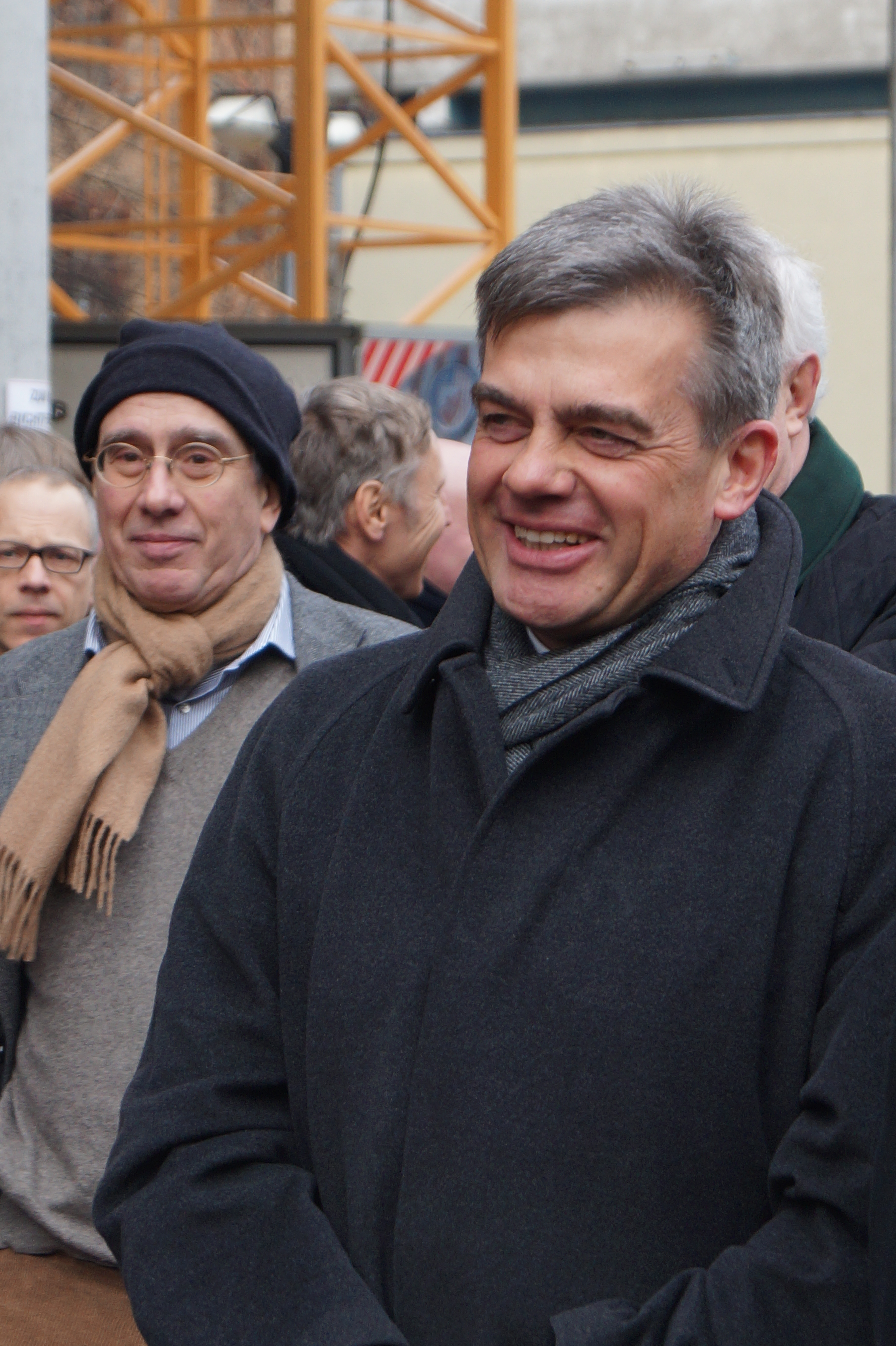 Richtfest Charité-Neubau mit OP-Bereich, Intensivmedizin und Rettungsstelle 2015